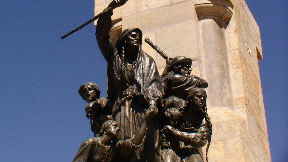 MONUMENTO A LAS HEROÍNAS DE LA CORONILLA Declarado Monumento Nacional el 14 de octubre de 1926; esta asentado sobre la Colina de San Sebastián, ubicada al sud de Cochabamba. El monumento hecho en bronce, tiene un alto de 6,00 mts. y ancho de 2,00 mts. erigido en homenaje a las Heroínas de la Coronilla y al movimiento independentista del 27 de mayo de 1812. En mayo de dicho año, Goyeneche estaba al frente de las tropas realistas y una vez que derrotó a las tropas patriotas que estaban al mando de Esteban Arce avanzo hacia Cochabamba que preparaba la resistencia con muy escasos recursos. Los pocos habitantes del lugar en su mayoría mujeres salieron a enfrentar la invasión española a la cabeza de doña Mañuela Gandarillas que, aun estando ciega, comando valerosamente el regimentó civil femenino. Se atrincheraron en la colina de San Sebastián. Finalmente Goyeneche entró a Cochabamba el 27 de mayo de 1812, quebrando la heroica resistencia. Para que las personas nunca olvidaran el valor que tuvieron aquellas mujeres cochabambinas, este lugar recibió el nombre de “Coronilla”. En el inicio de la colina hay dos leones de metal antiguamente estos fueron dos cañones de guerra. En el monumento se representa a tres mujeres, 2 niños, un anciano y al centro la figura de Manuela Gandarillas quien liderizó la batalla. En la parte superior del monumento se encuentra una estatua de Cristo. Parte de la identidad de Cochabamba.